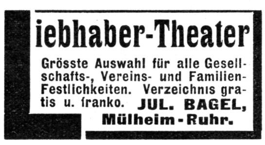 Anzeige "Liebhaber-Theater" von Jul. Bagel, Mülheim-Ruhr.